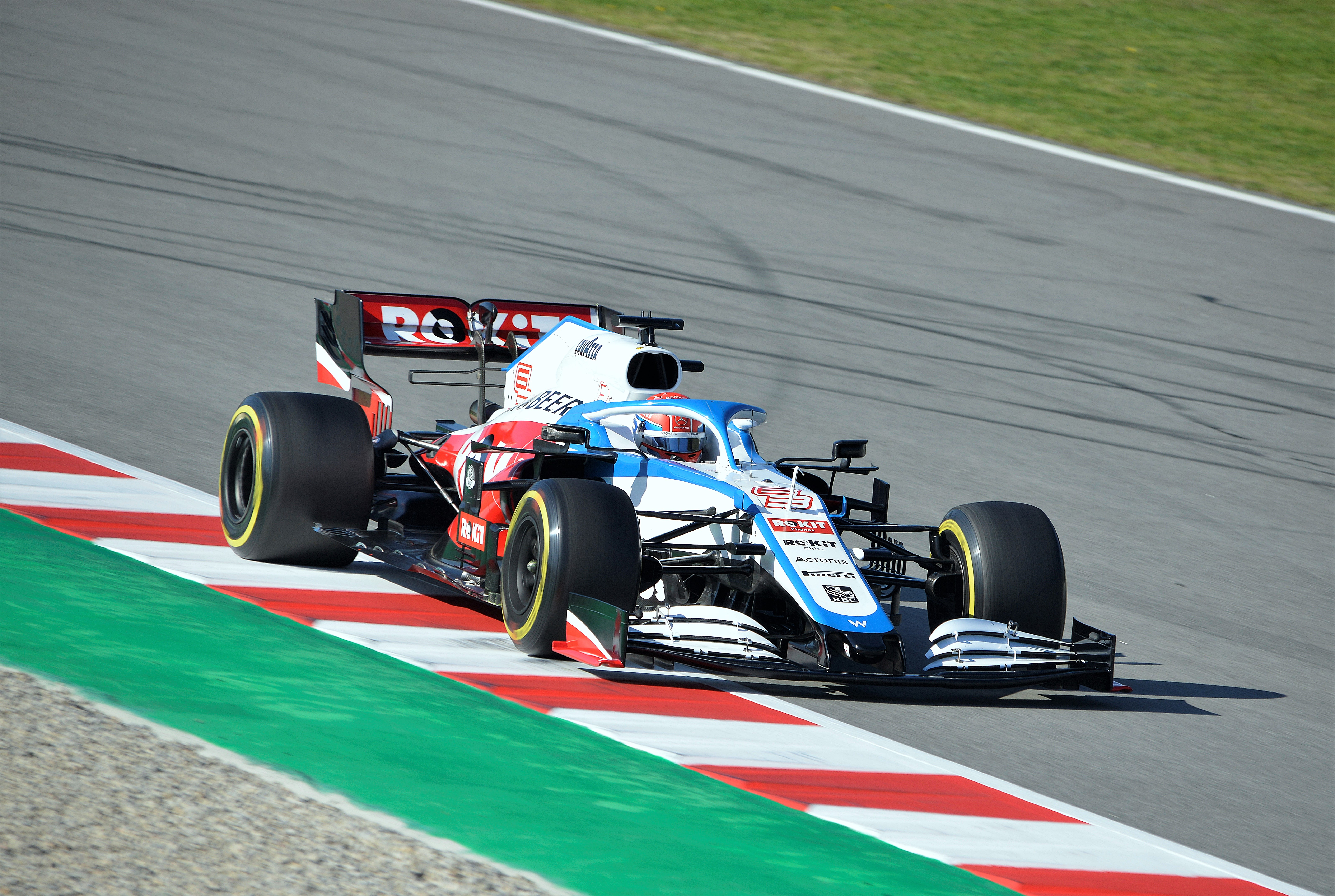 Test Days F1 2020